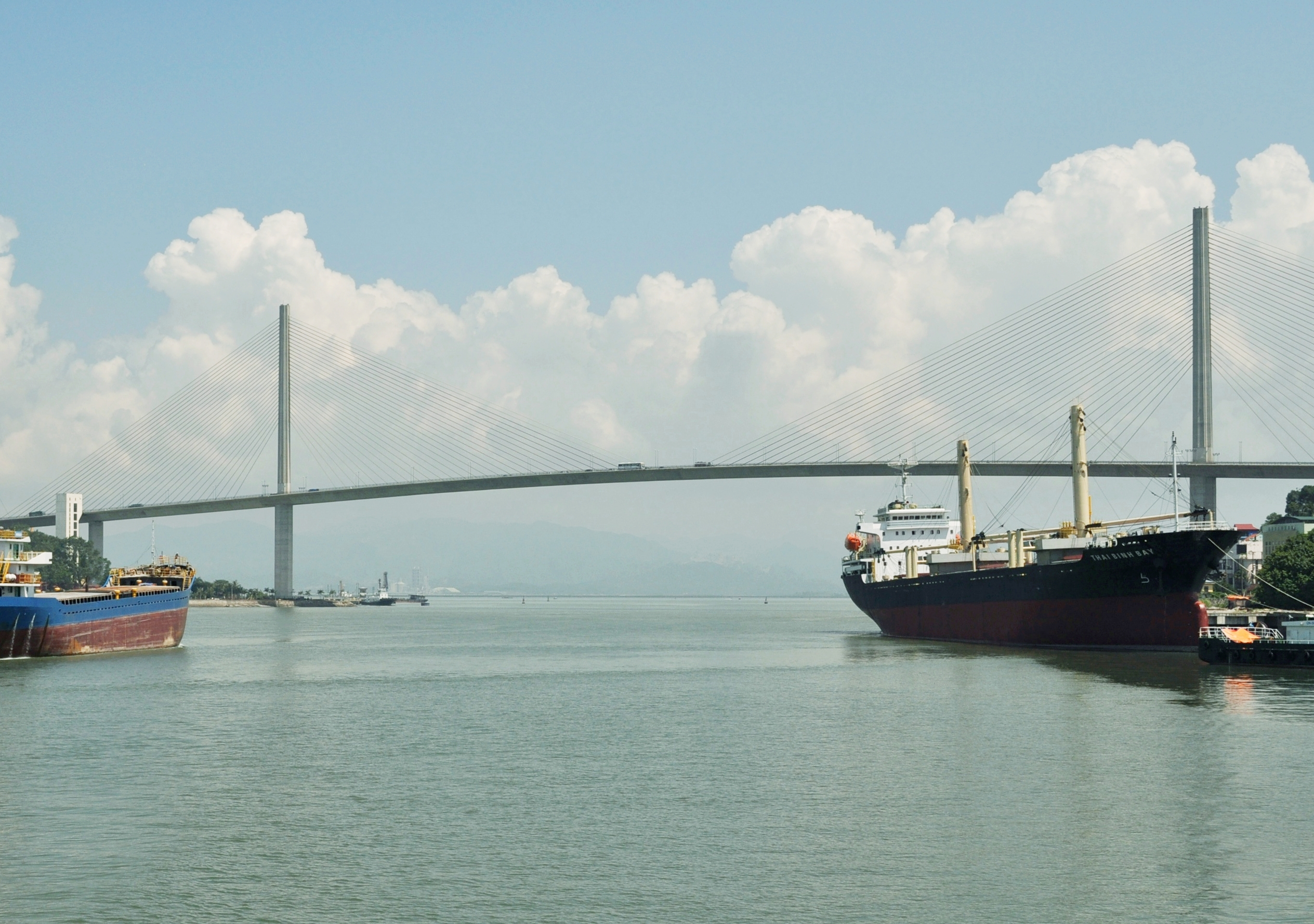 Bai Chai Bridge, Ha Long Bay, Vietnam.